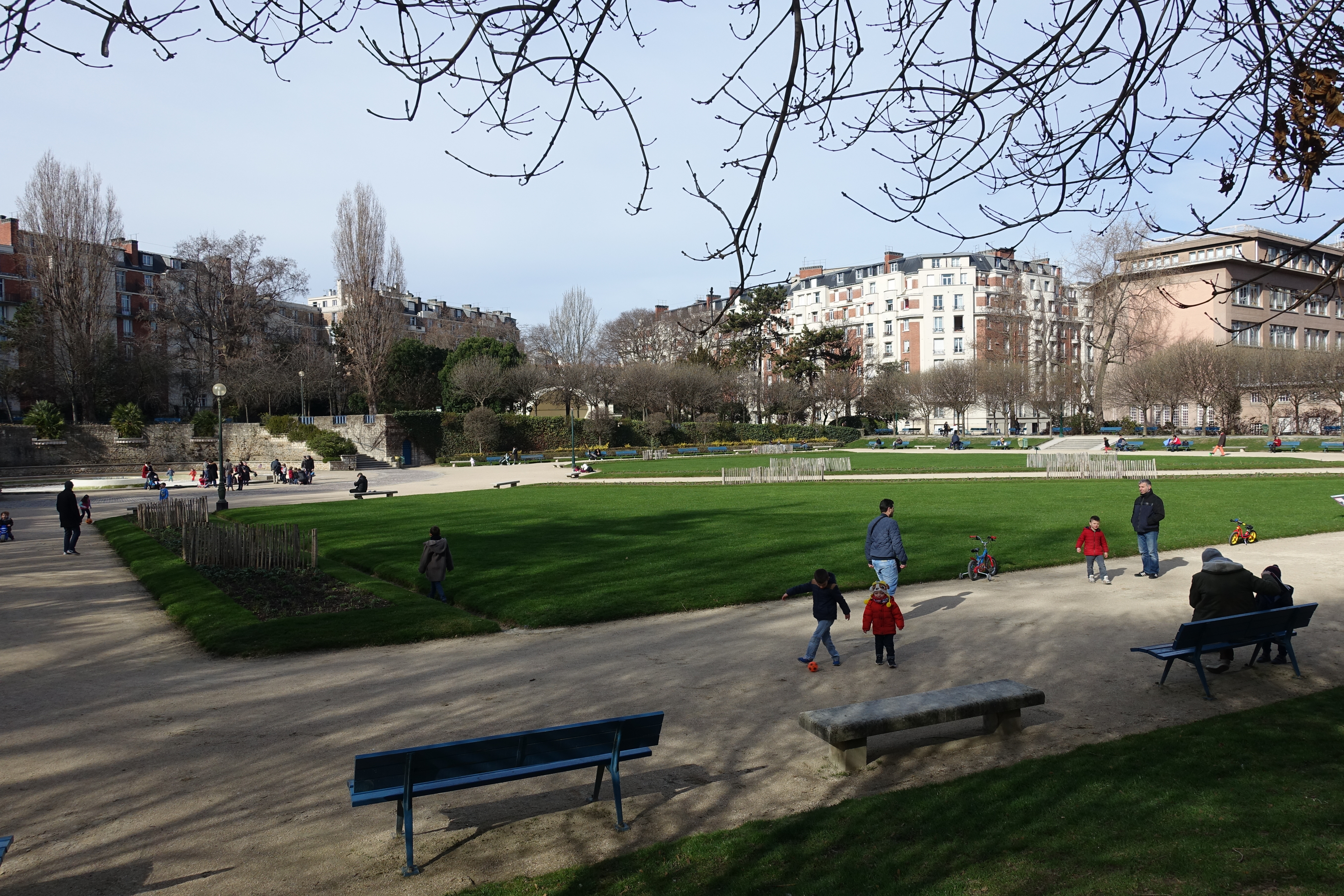 Square Saint-Lambert @ Paris 15